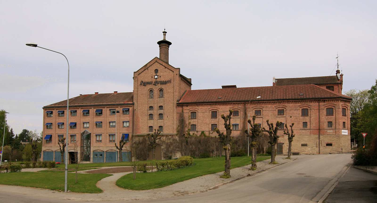 Hamar bryggeri. Fasade mot Storhamargata.